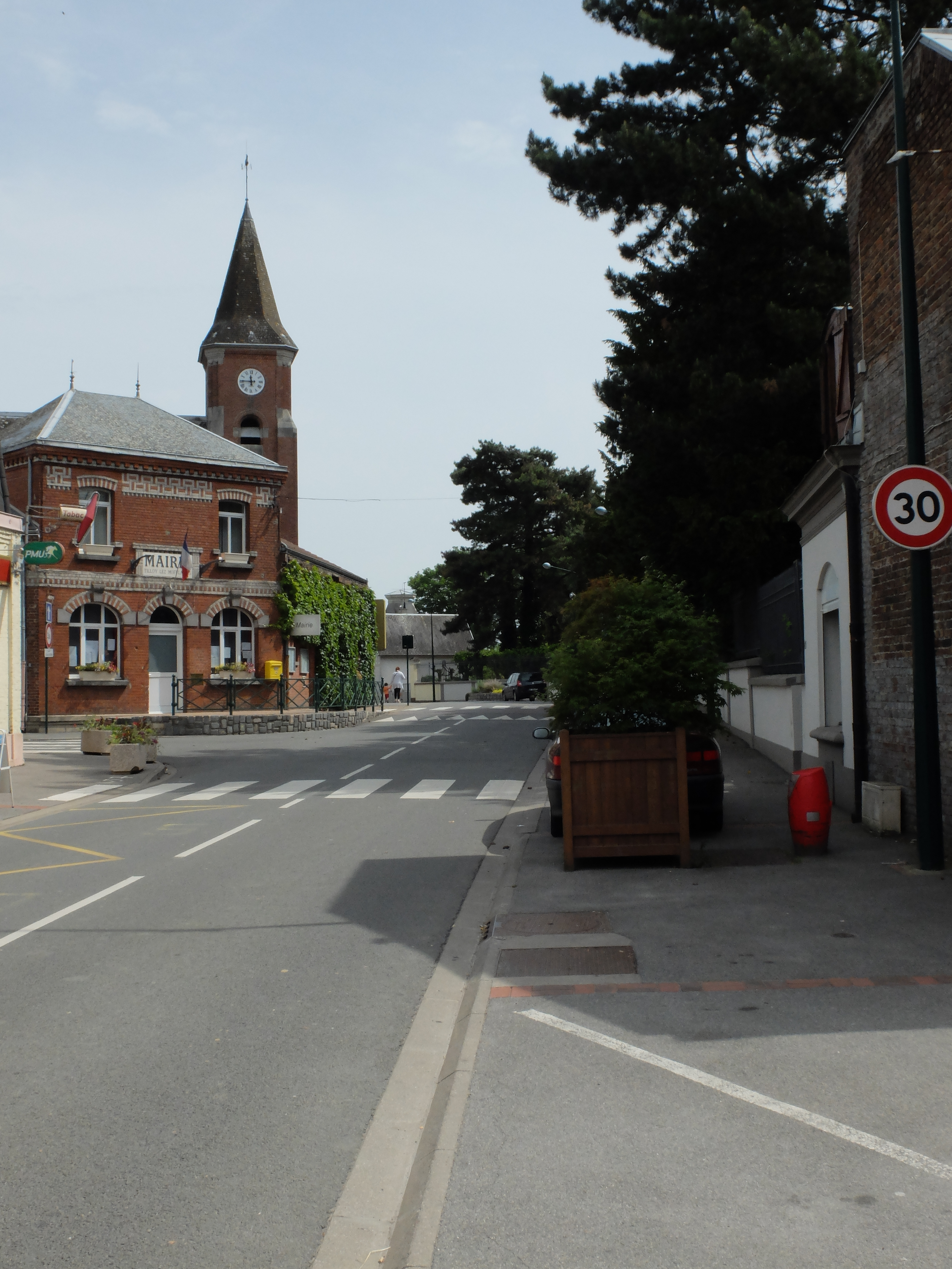 Vue de l'avenue Charles-de-Gaulle de Tilloy-lès-Mofflaines.